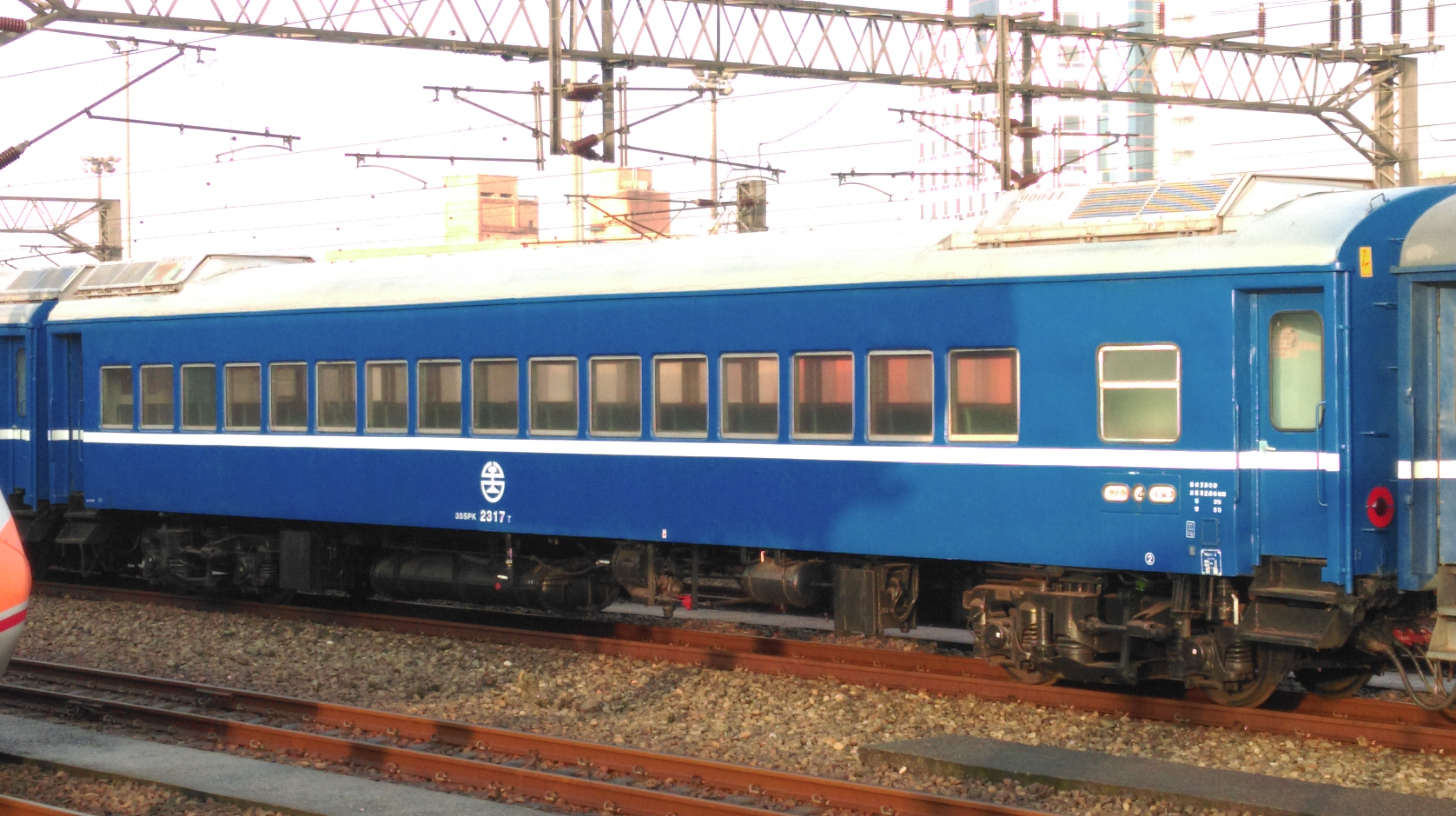 經臺灣鐵路管理局高雄機廠整修後改變塗裝之冷氣平快車廂35SPK2317，配合illsmp社團包車，留置七堵車站股道中。